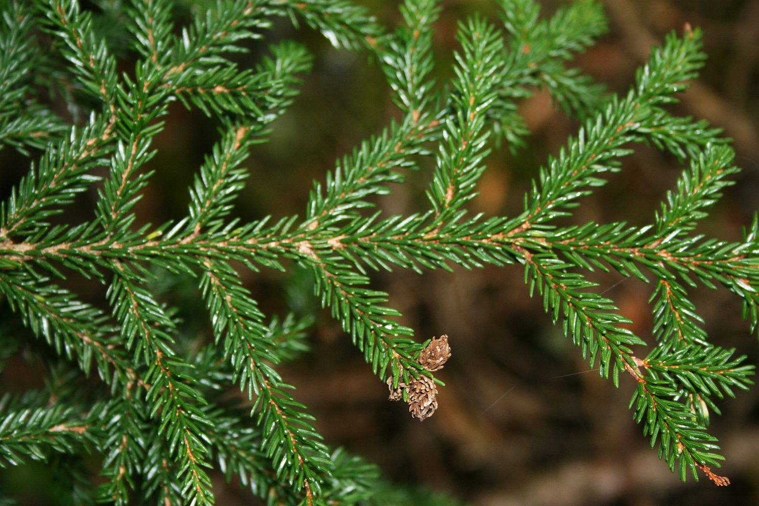 Picea orientalis, Kieferngewächse (Pinaceae) – Georgien/საქართველო: Kleiner Kaukasus, zwischen Didi Mitarbi und Patara Mitarbi, ENE Bakuriani/ბაკურიანი, ca. 1410 m s.m.